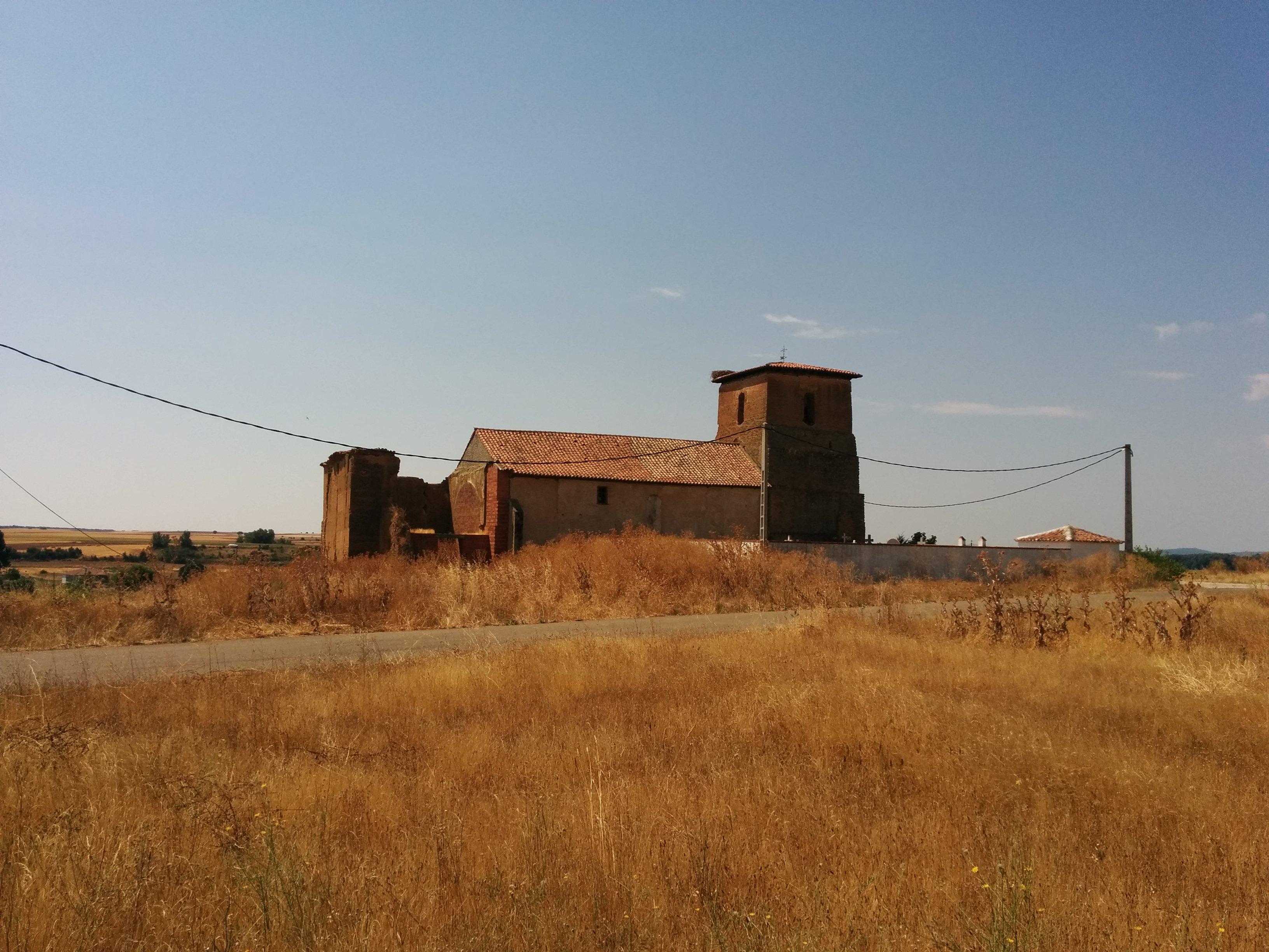 Vista desde lejos de la Iglesia de Santa María de La Antigua.